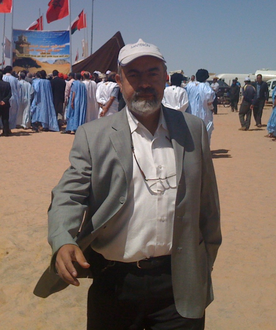 photo de l’écrivain mohammed tamim